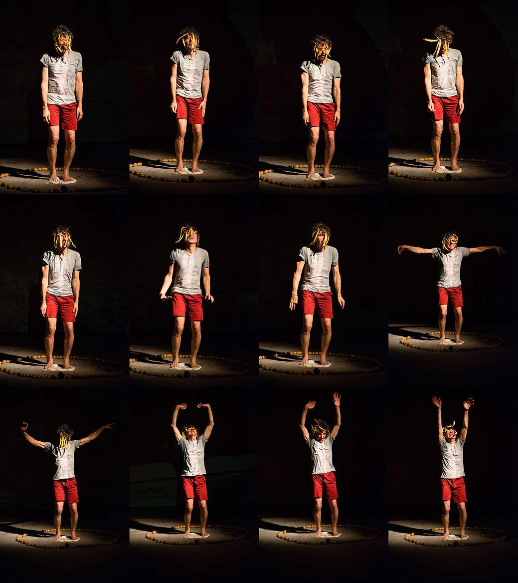 Oleg Soulimenko